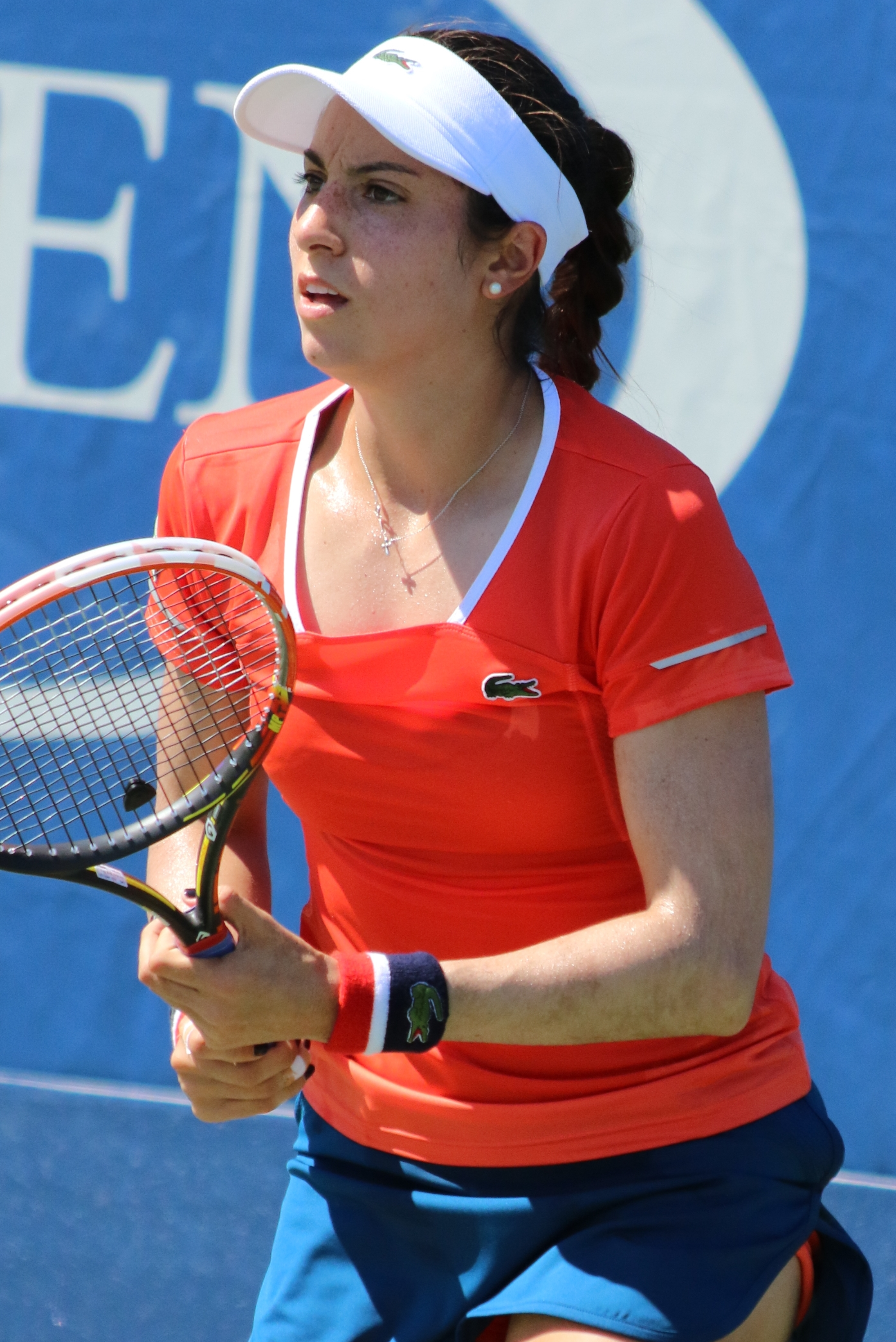 McHale US16 (1)